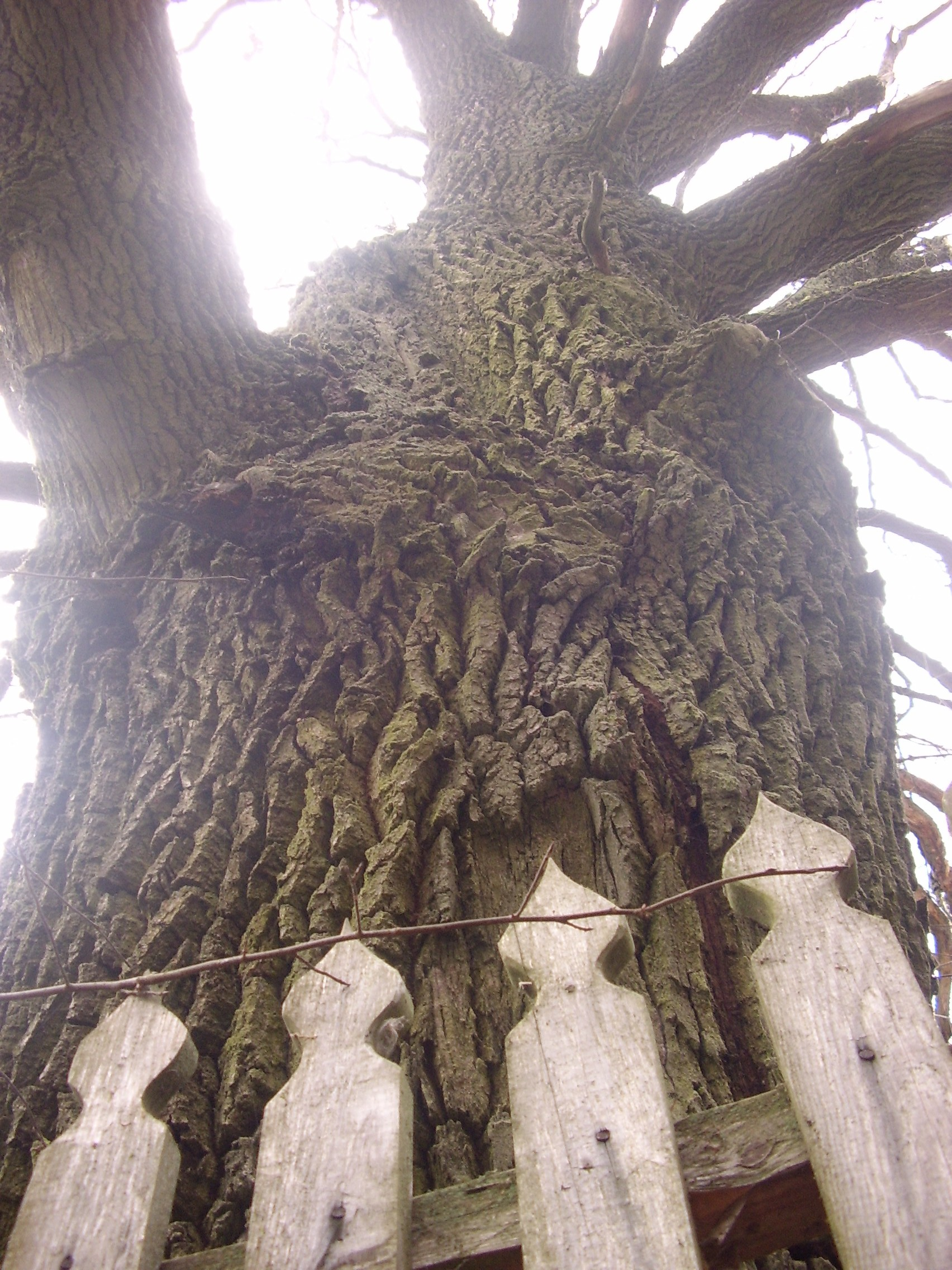 Dubininko ąžuolas. Autorius: Mykolas Zovė